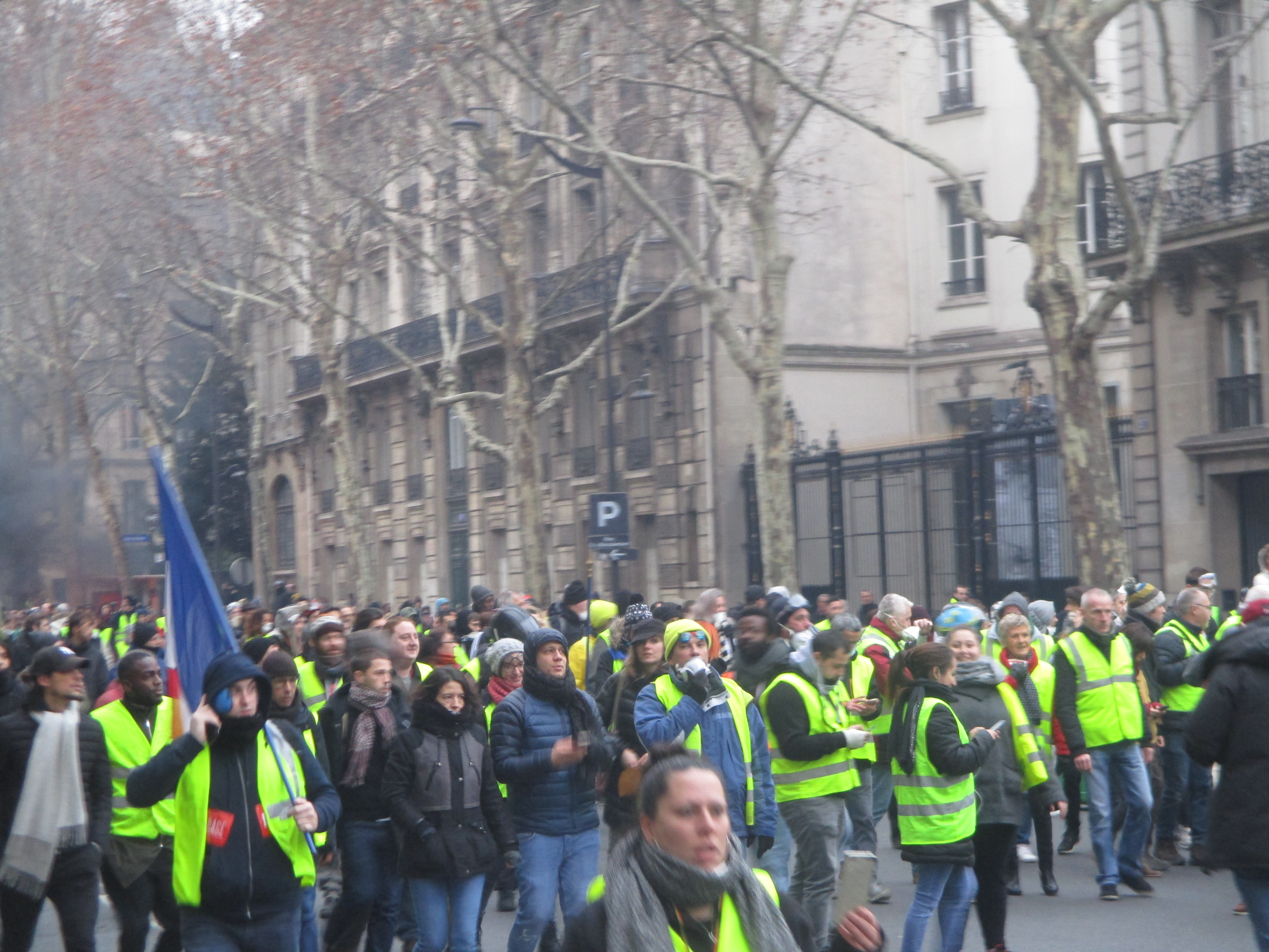 Manifestation des gilets jaunes le 5 janvier 2019 à Paris, boulevard Saint-Germain.